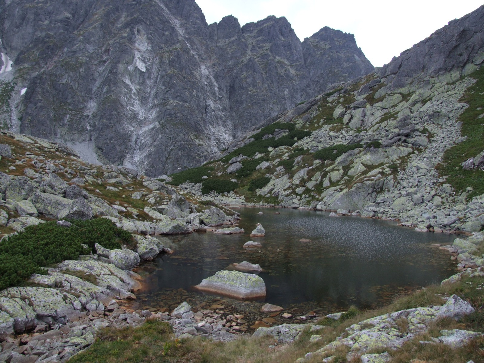 Szatani Stawek w Dolinie Mięguszowieckiej